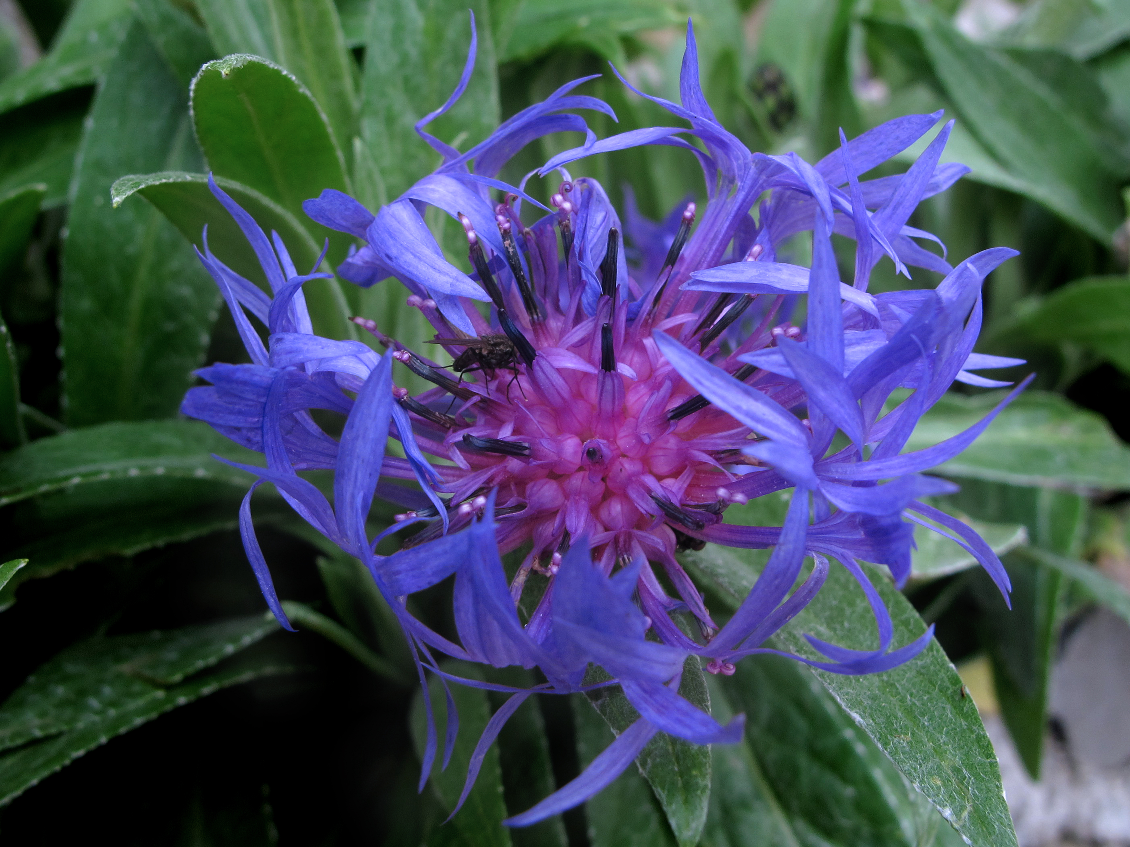 Es generalizada y común en el sur de las cadenas montañosas de Europa